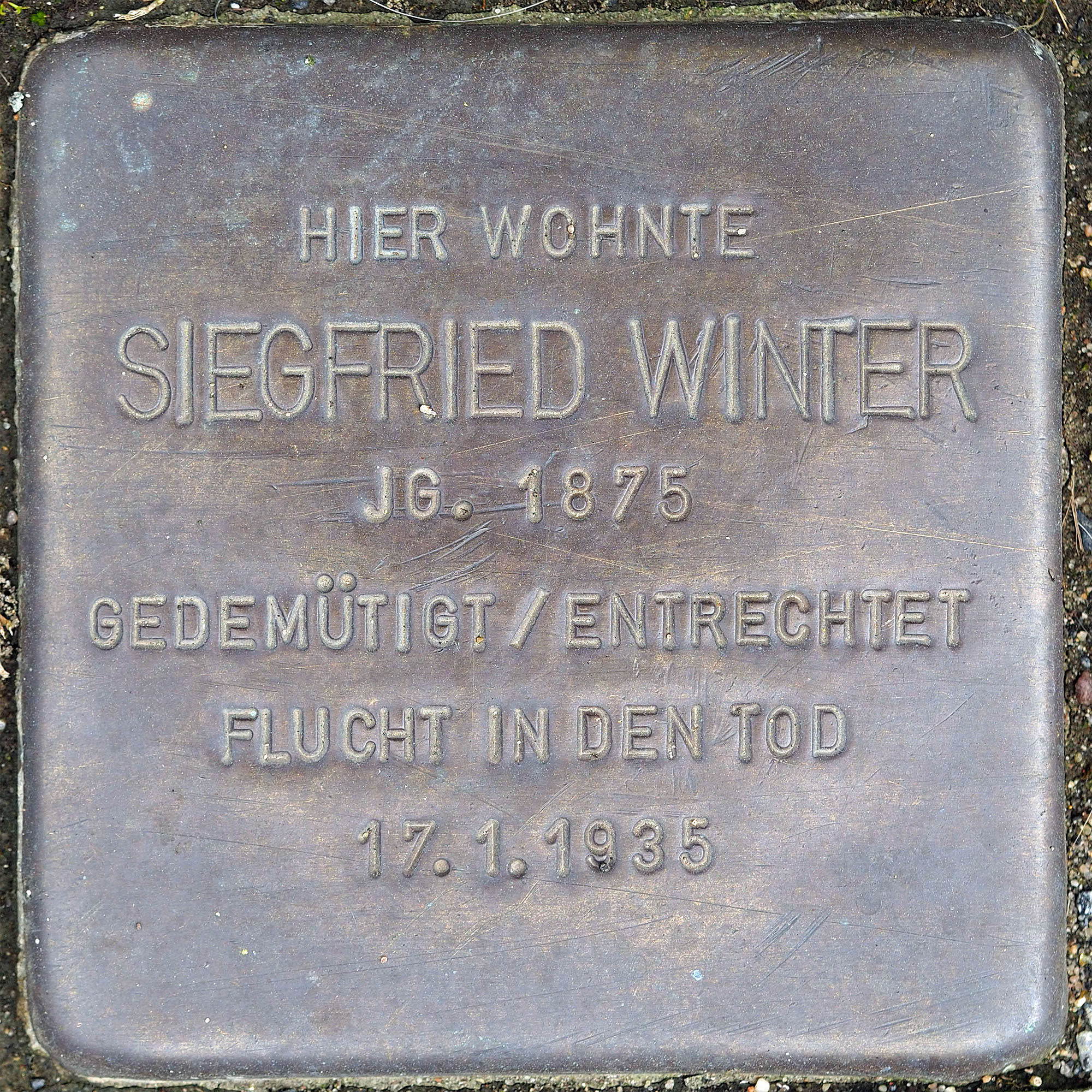 Stolpersteine Korschenbroich: Winter, Siegfried